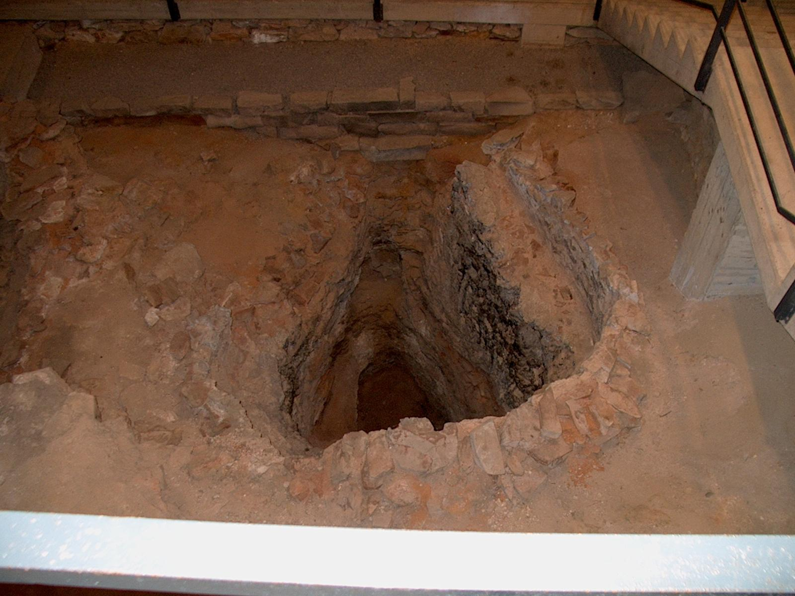 Römischer 6-fach Kalkofen aus dem 3. Jahrhundert bei Bad Münstereifel-Iversheim, Ansicht von oben